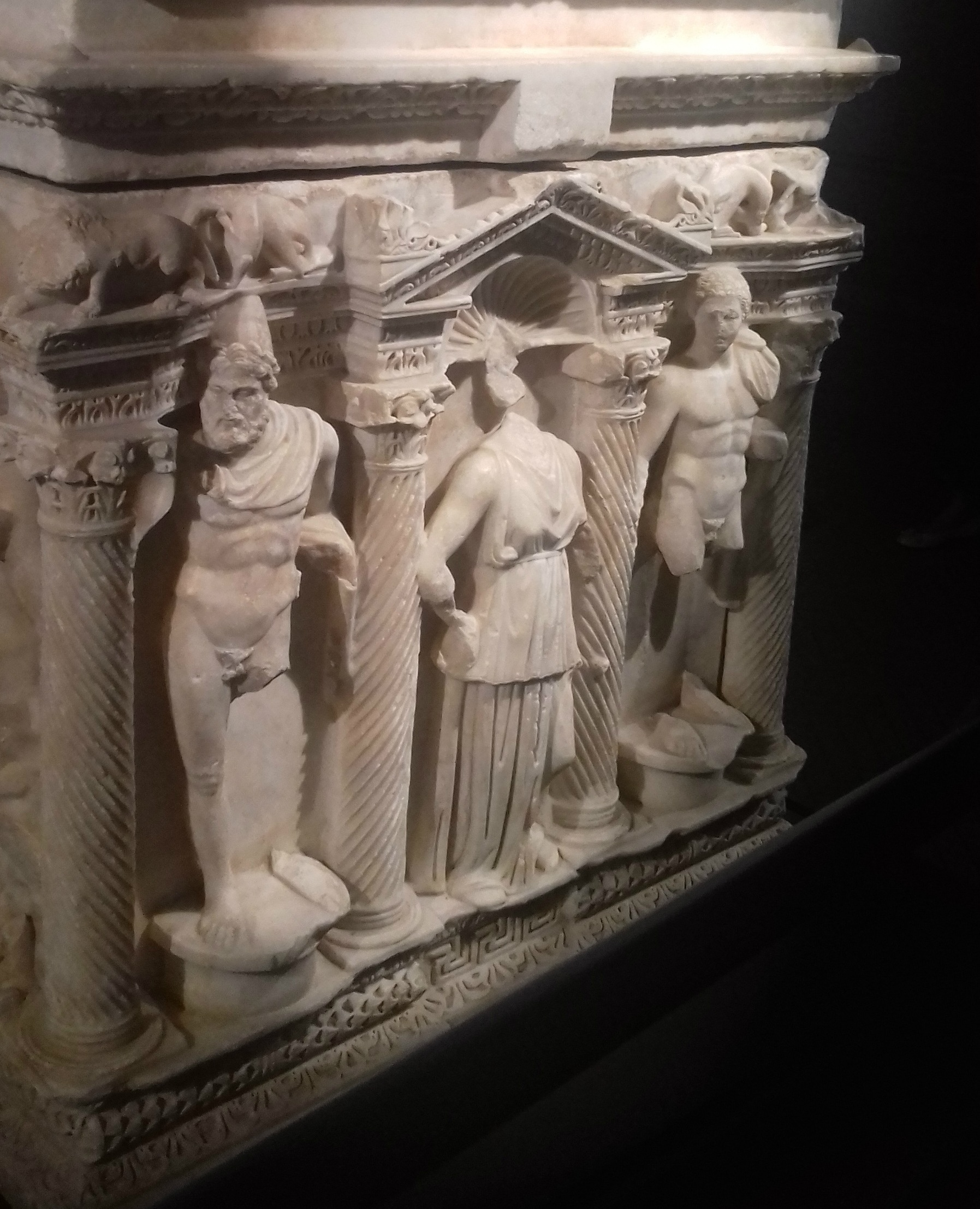 Sarcofago di Rapolla - lato sinistro